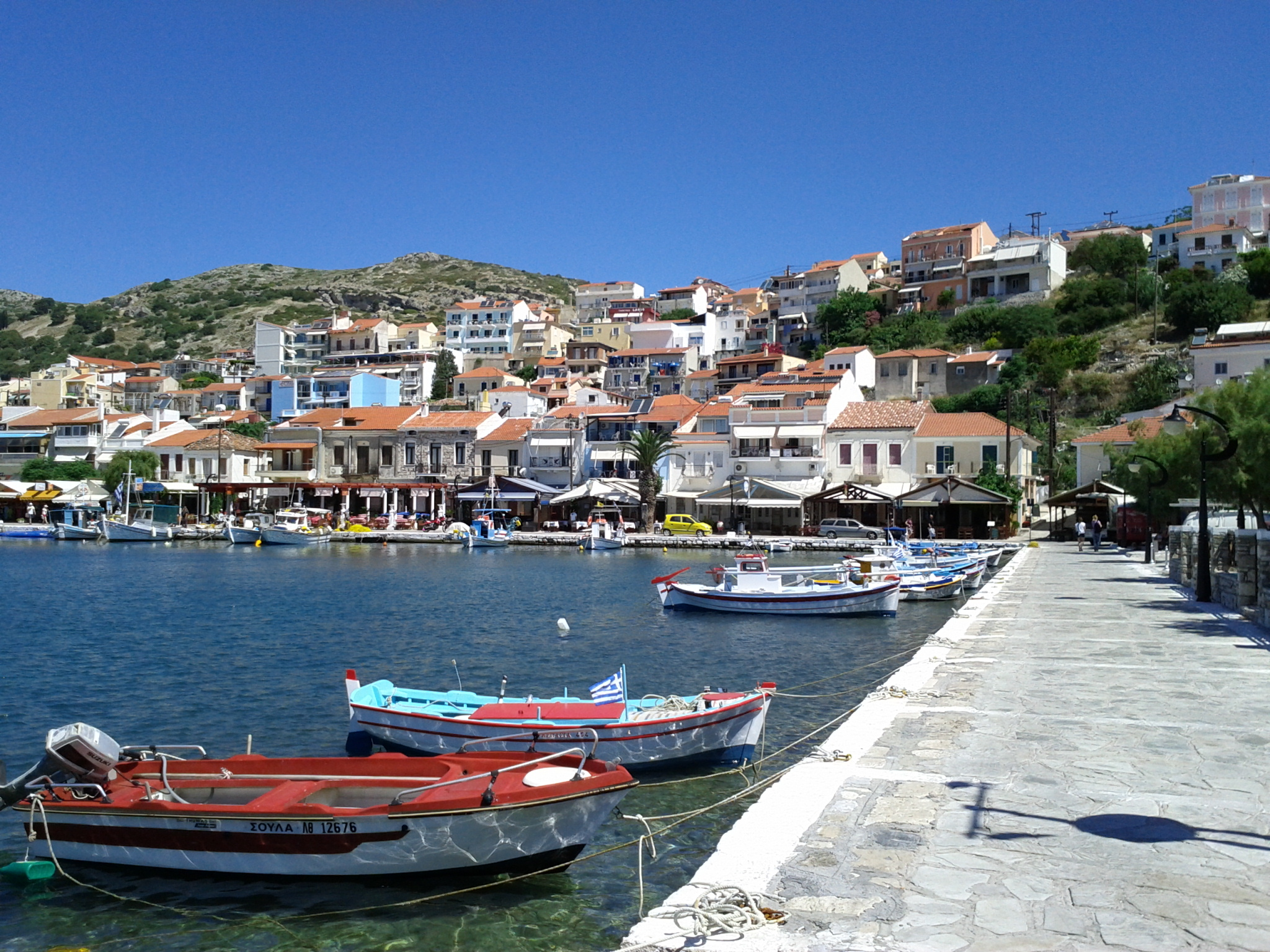 Pythagorio